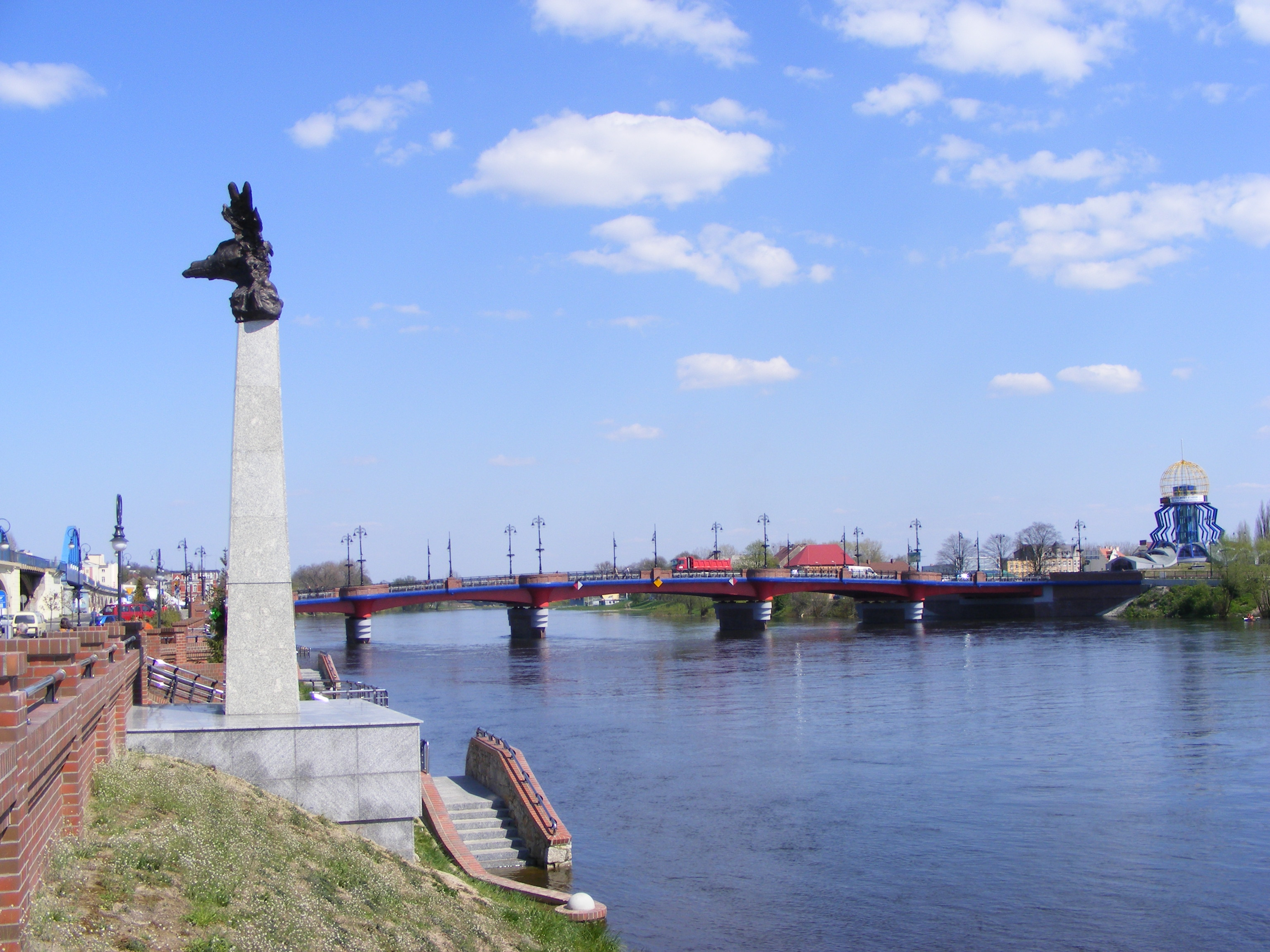 Gorzów Wielkopolski most i bulwar